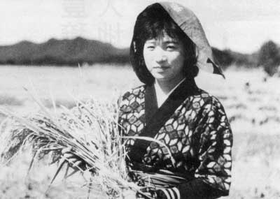 田沢疏水事業完成